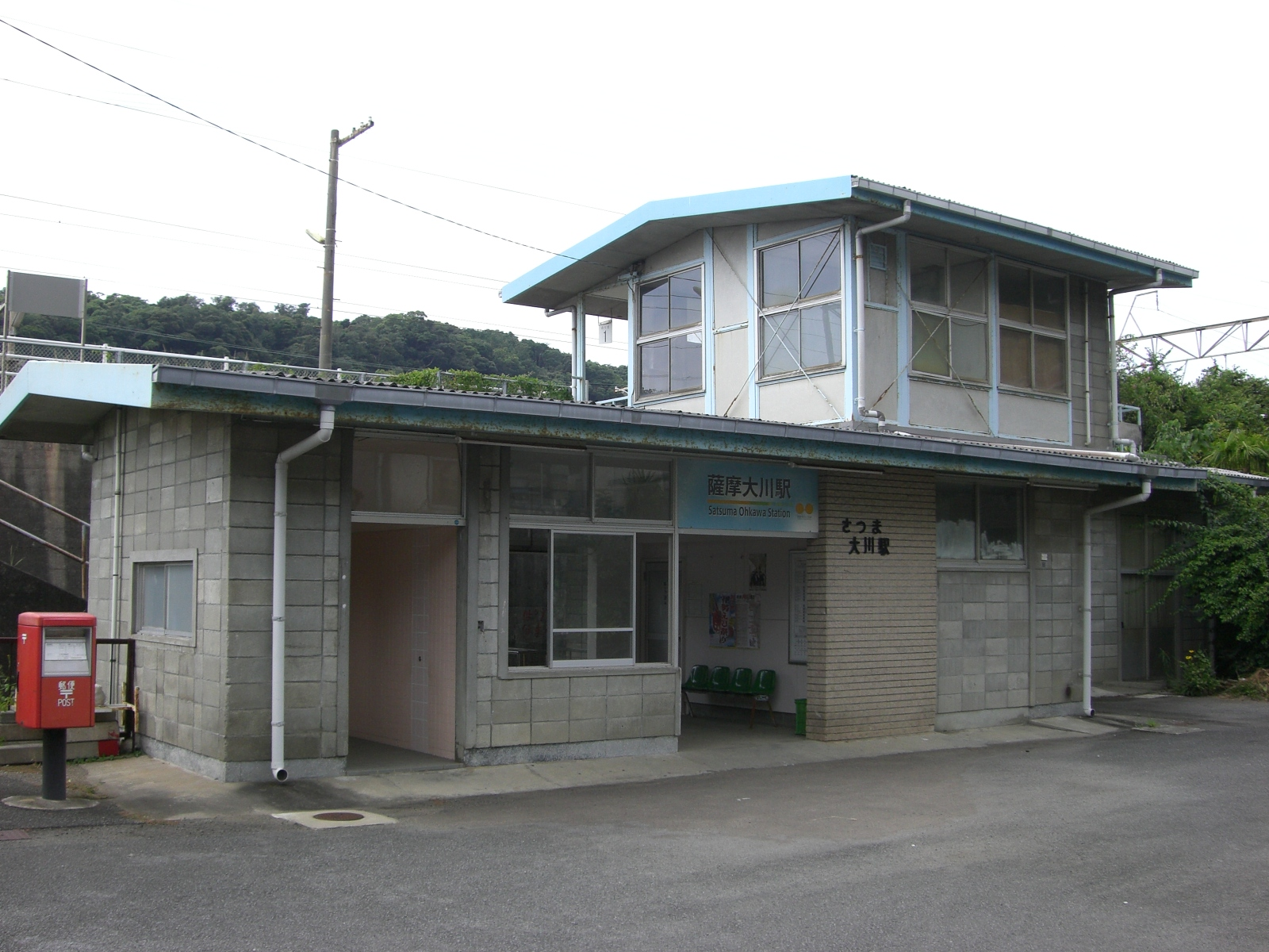 薩摩大川駅